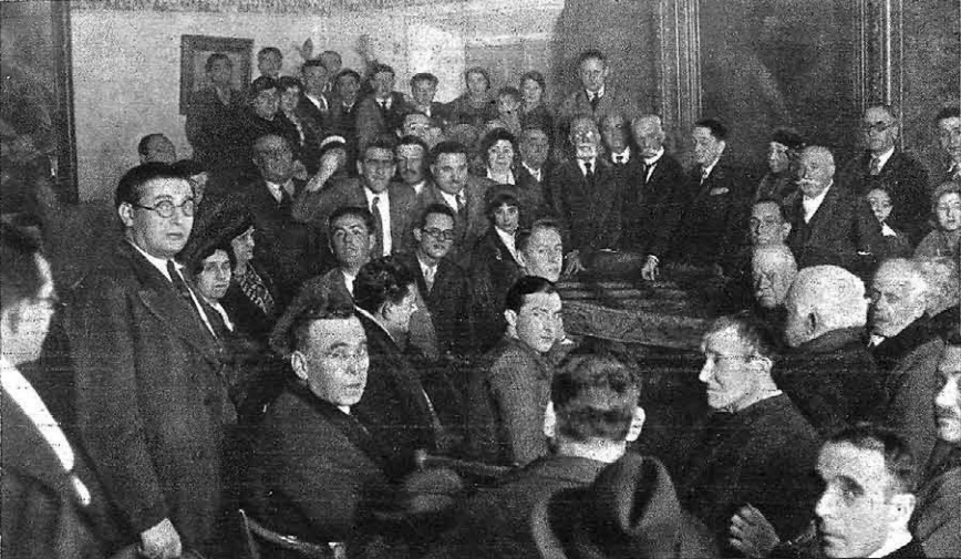 Reunión del Círculo carlista de Madrid presidida por el General Pérez Nájera